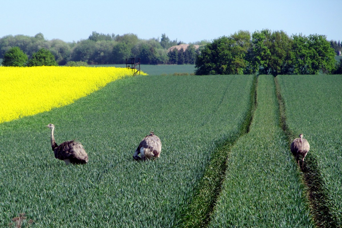 Nandus auf einem Feld bei Schlagsdorf, Nordwestmecklenburg, im Mai 2018